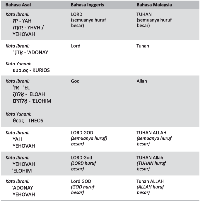 Pemiawaian bagi nama-nama dan gelaran Ilahi asal bahasa Ibrani dan Yunani yang diguna pakai dalam Alkitab Bahasa Malaysia